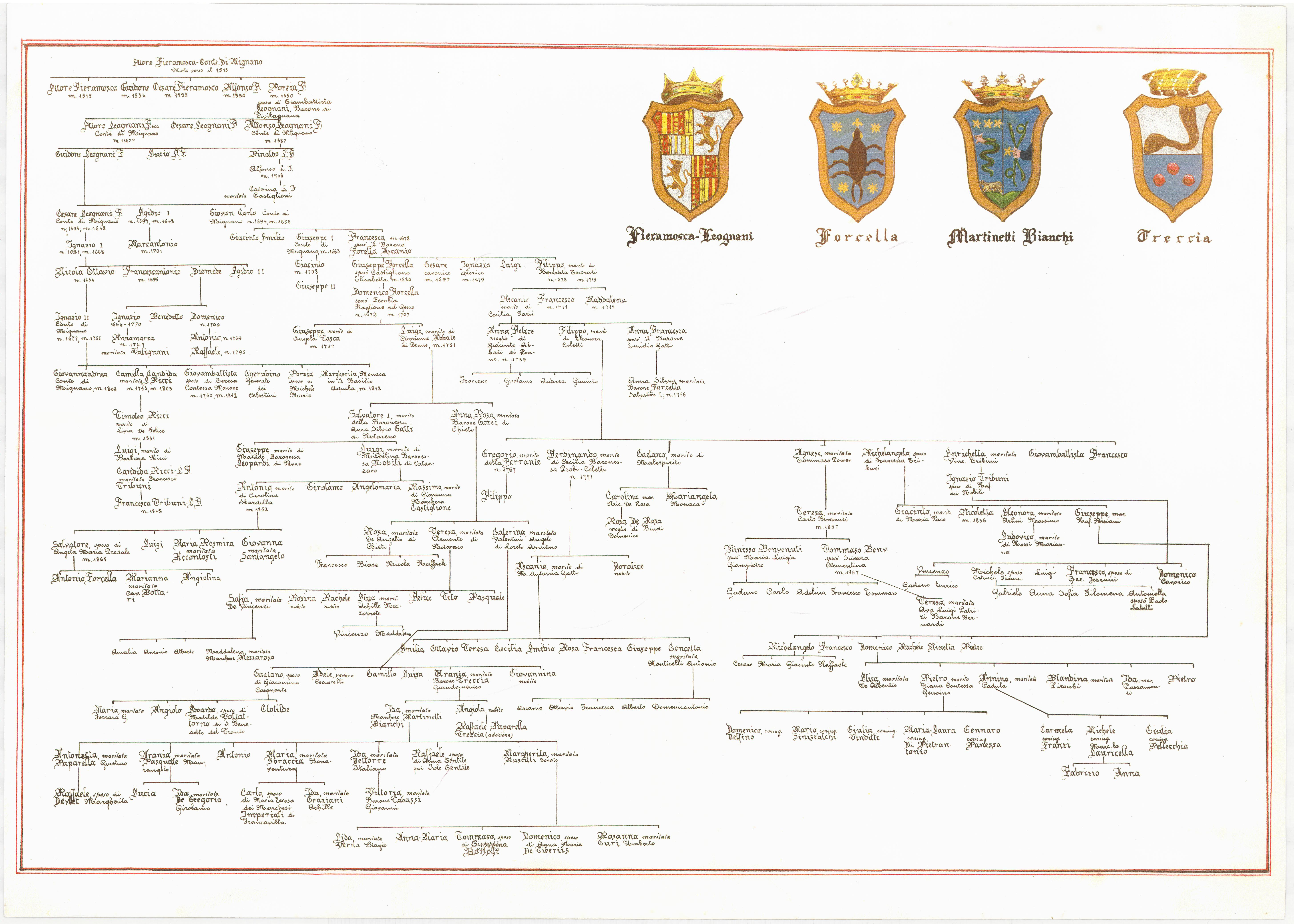 Genealogia delle famiglie Forcella, Treccia e Martinetti Bianchi con capostipite famiglia Fieramosca